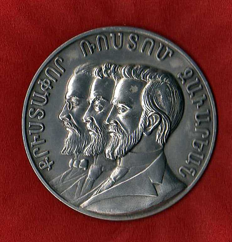 Médaille récente à l'effigie de Christapor Mikaelian, Stepan Zorian (dit Rostom) et Simon Zavarian, fondateurs de la Fédération révolutionnaire arménienne (Dachnak) en 1890